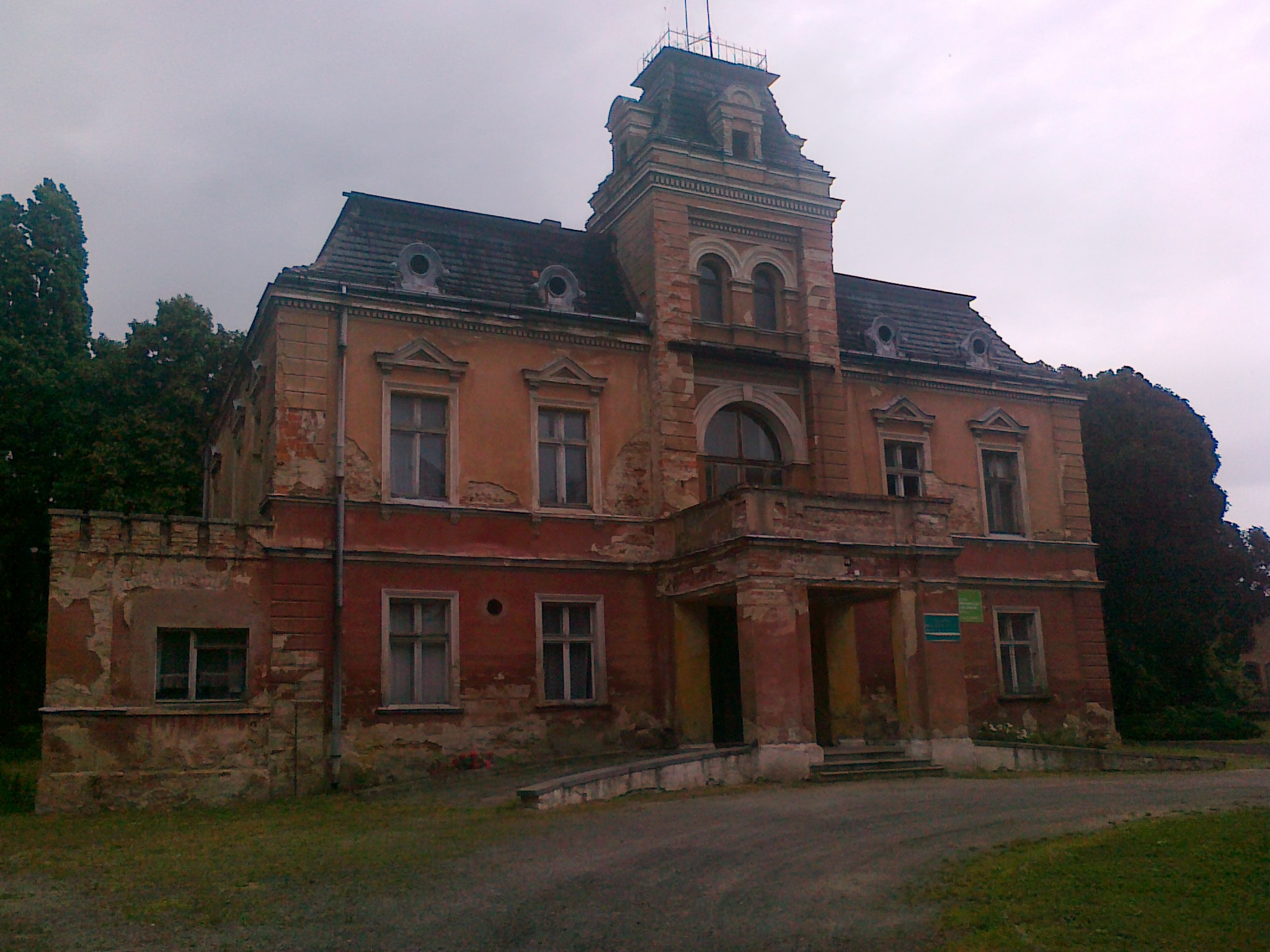 Łojowice - pałac (zabytek nr A/2429/608/W)